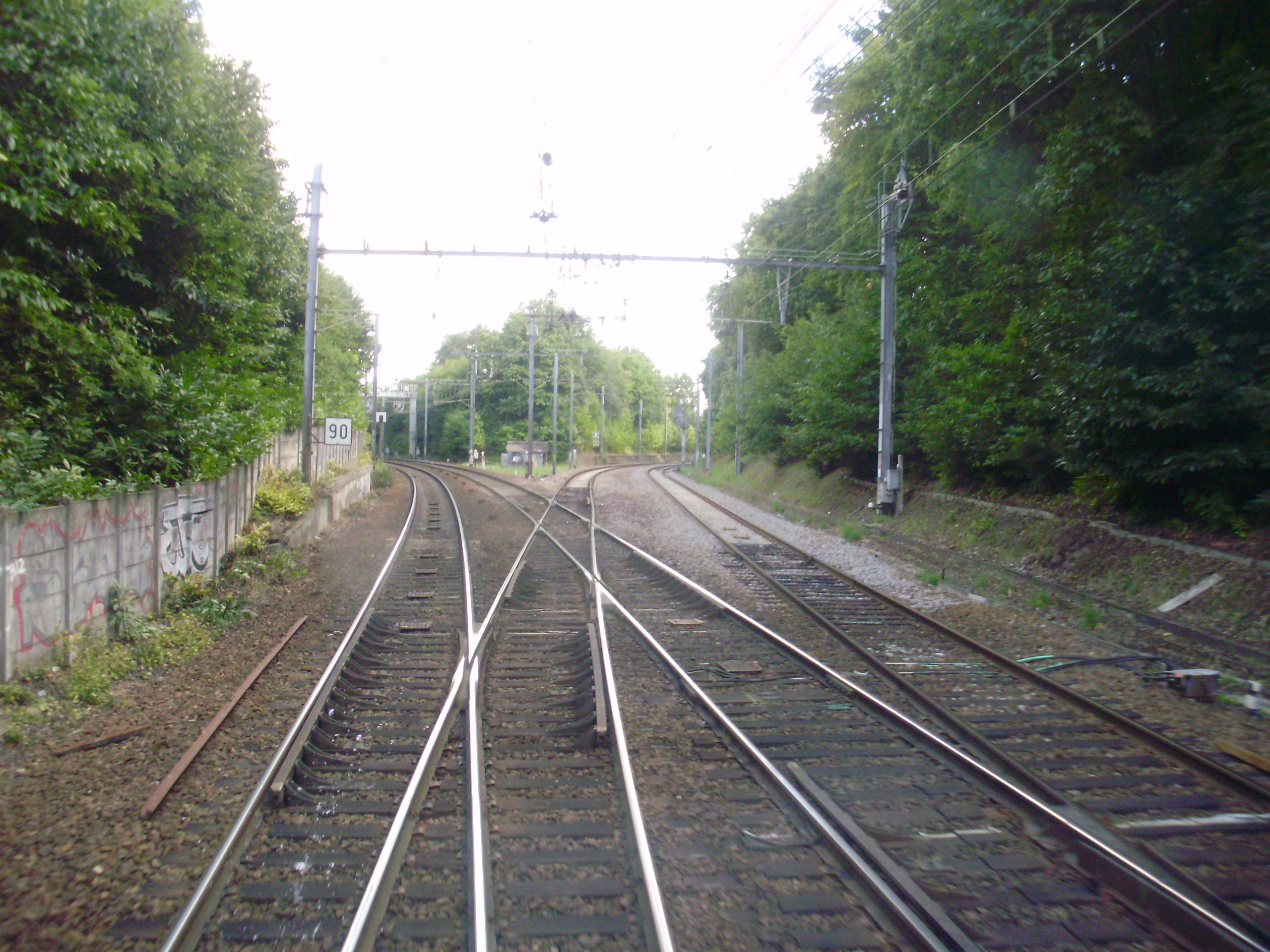 Bifurcation de Bois Cassé, sur le territoire de Saint-Cyr-l'École, Yvelines, France : à gauche, voies vers la gare de Saint-Cyr ; à droite : raccordement dit de Saint-Cyr vers la gare de Saint-Quentin-en-Yvelines utilisé uniquement par les trains de fret